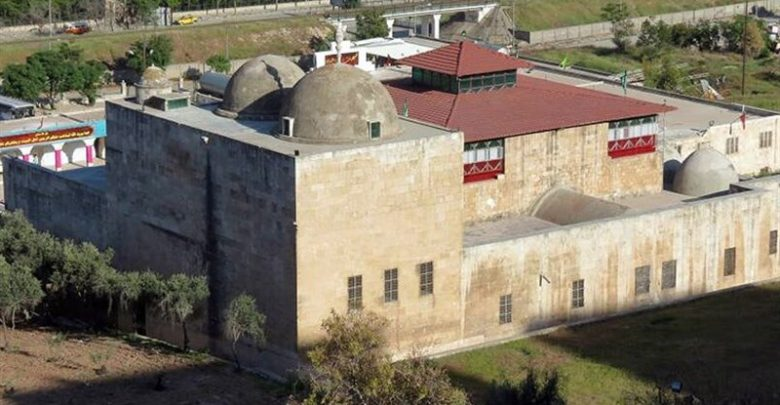 حي الزبدية